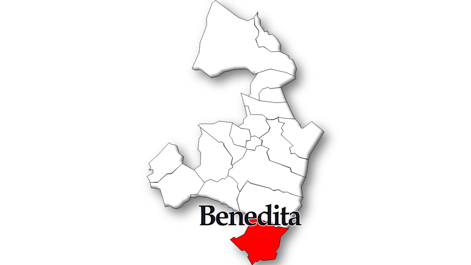 População